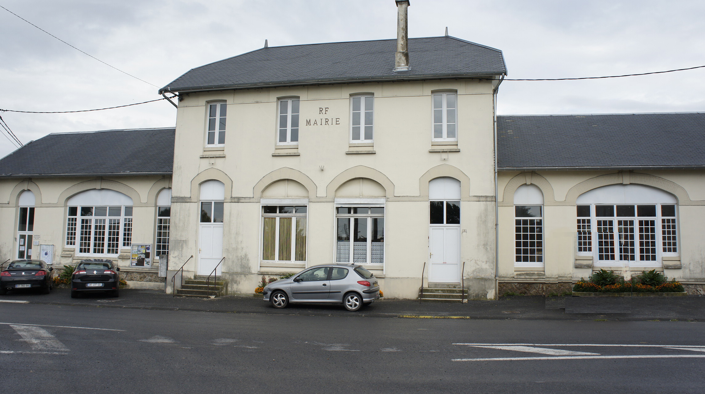 vue de la Mairie Souain.